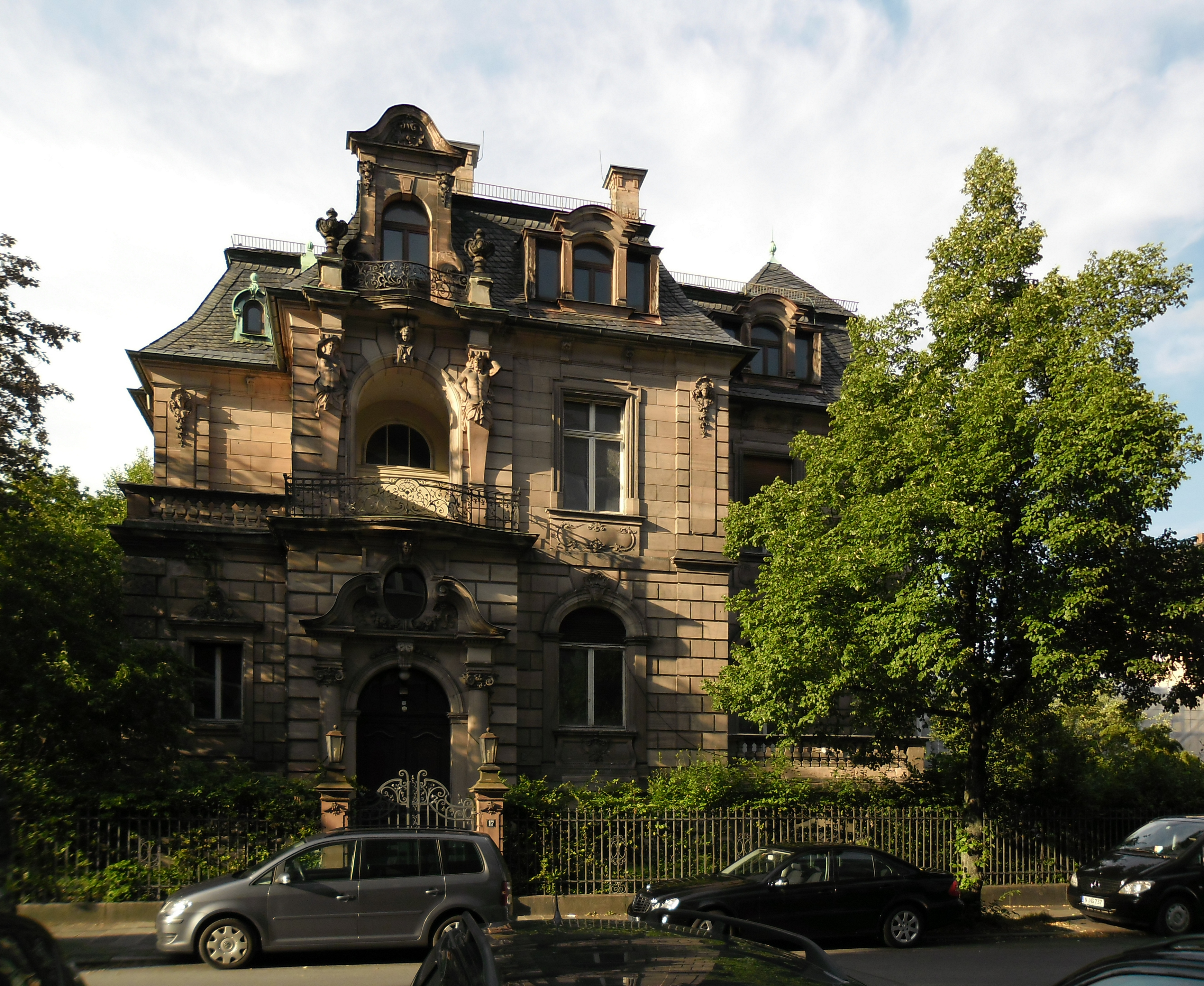 Kunstvilla Blumenstraße 17 Nürnberg-Gleißbühl 01